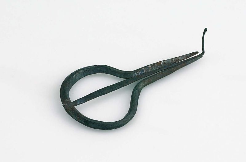 Tokkelinstrument. Mondharp van ijzer Unknown language: Rinding wesi